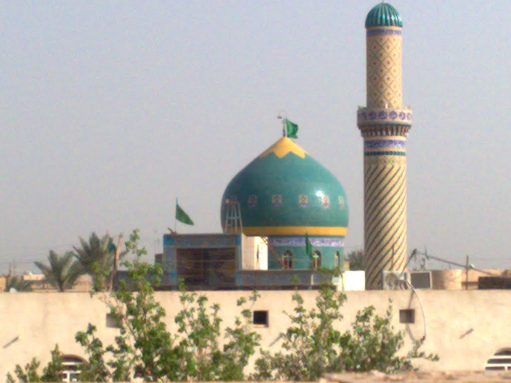 مرقد السيد يعسوب الدين بن موسى الكاظم في ناحية ابي غرق